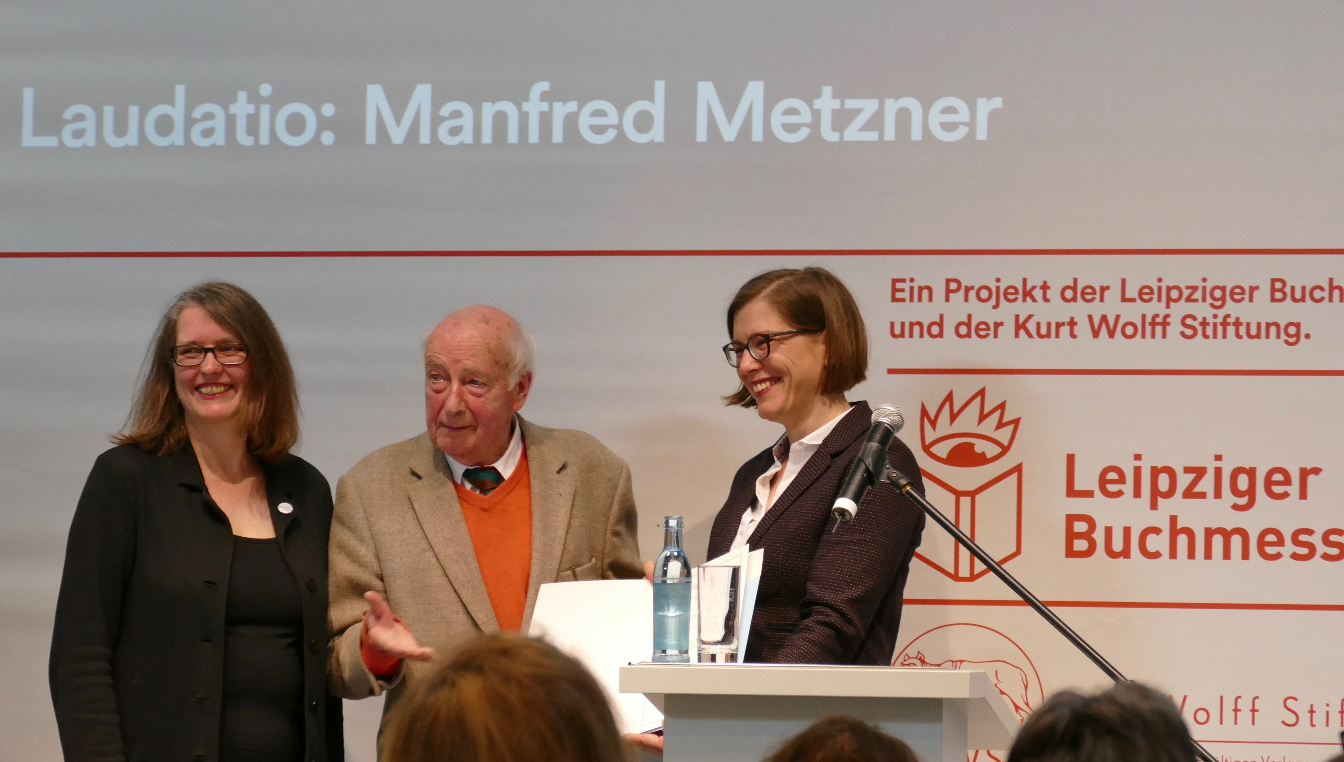 Andreas J. Meyer, Gründer des Merlin Verlages, erhält den Kurt-Wolff-Preis 2019. v.l.n.r: Britta Jürgs, Vorsitzende der Kurt Wolff Stiftung, Andreas J. Meyer, Skadi Jennicke, Bürgermeisterin und Beigeordnete für Kultur der Stadt Leipzig